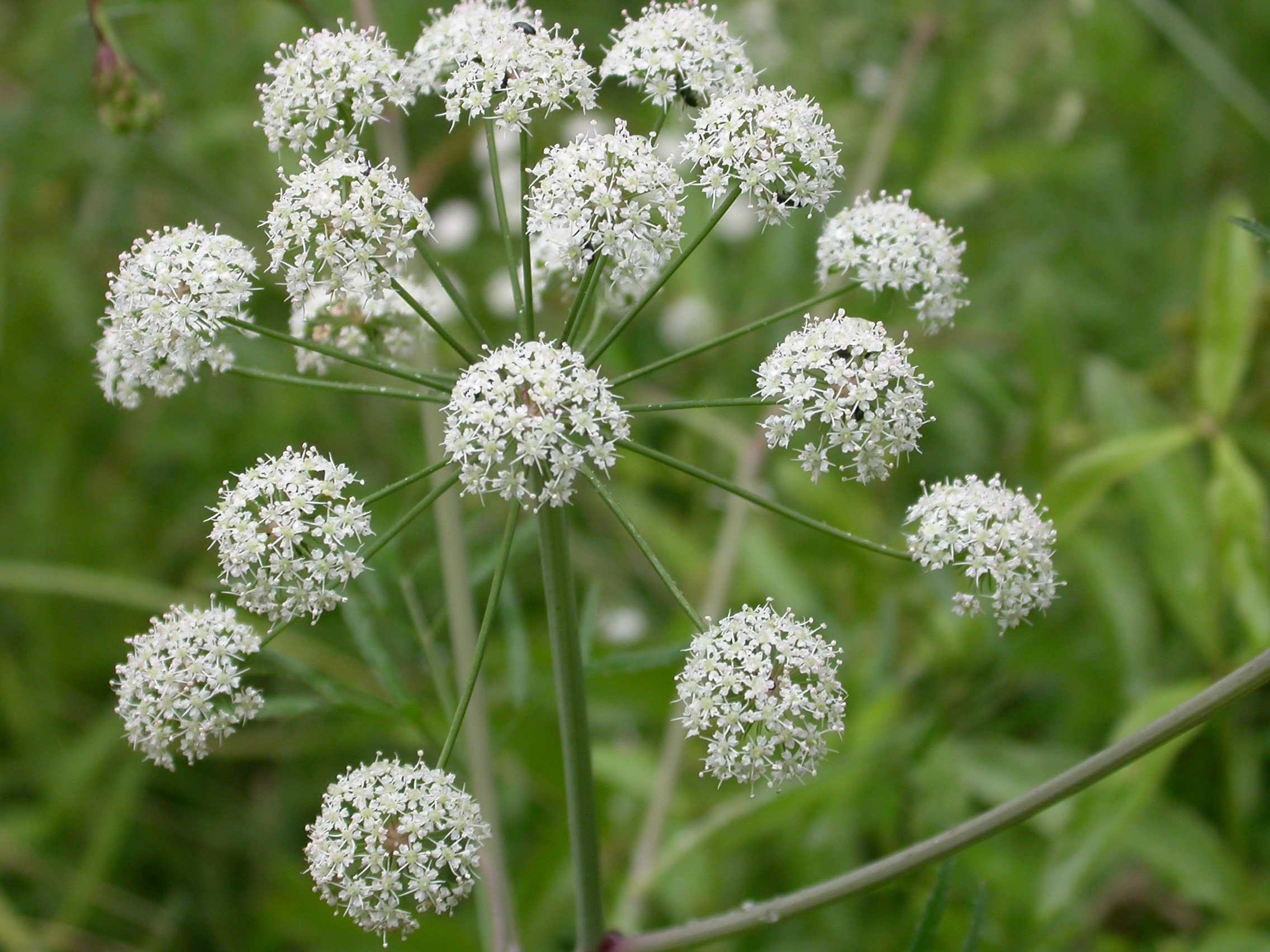 Cicuta virosa Creutzwald (Moselle), France